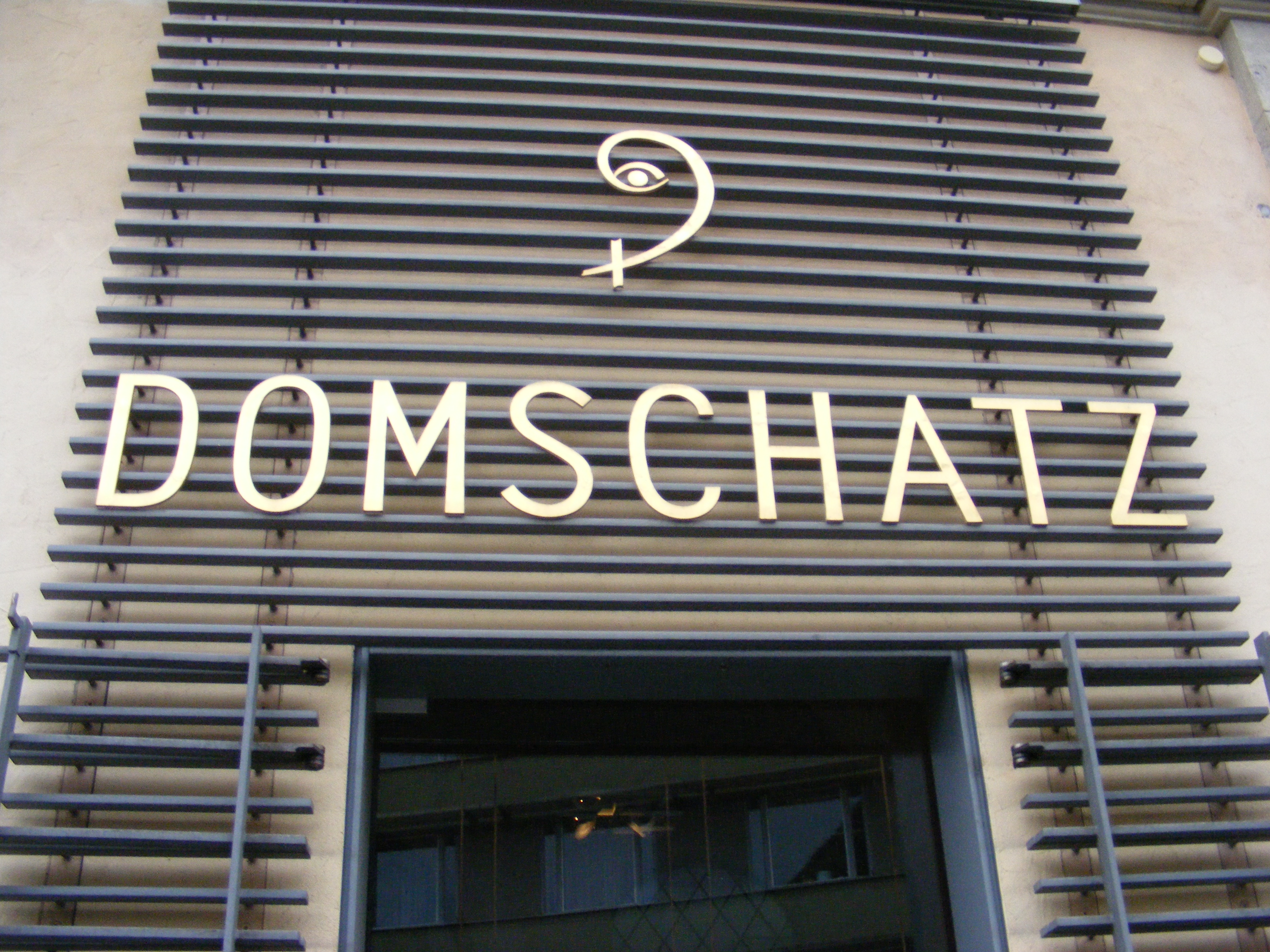 Domschatz Würzburg - Schild.